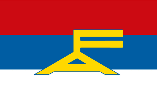 Bamanankan: Bandera del Frente Amplio lisa, históricamente conocida como "bandera de Otorgués".